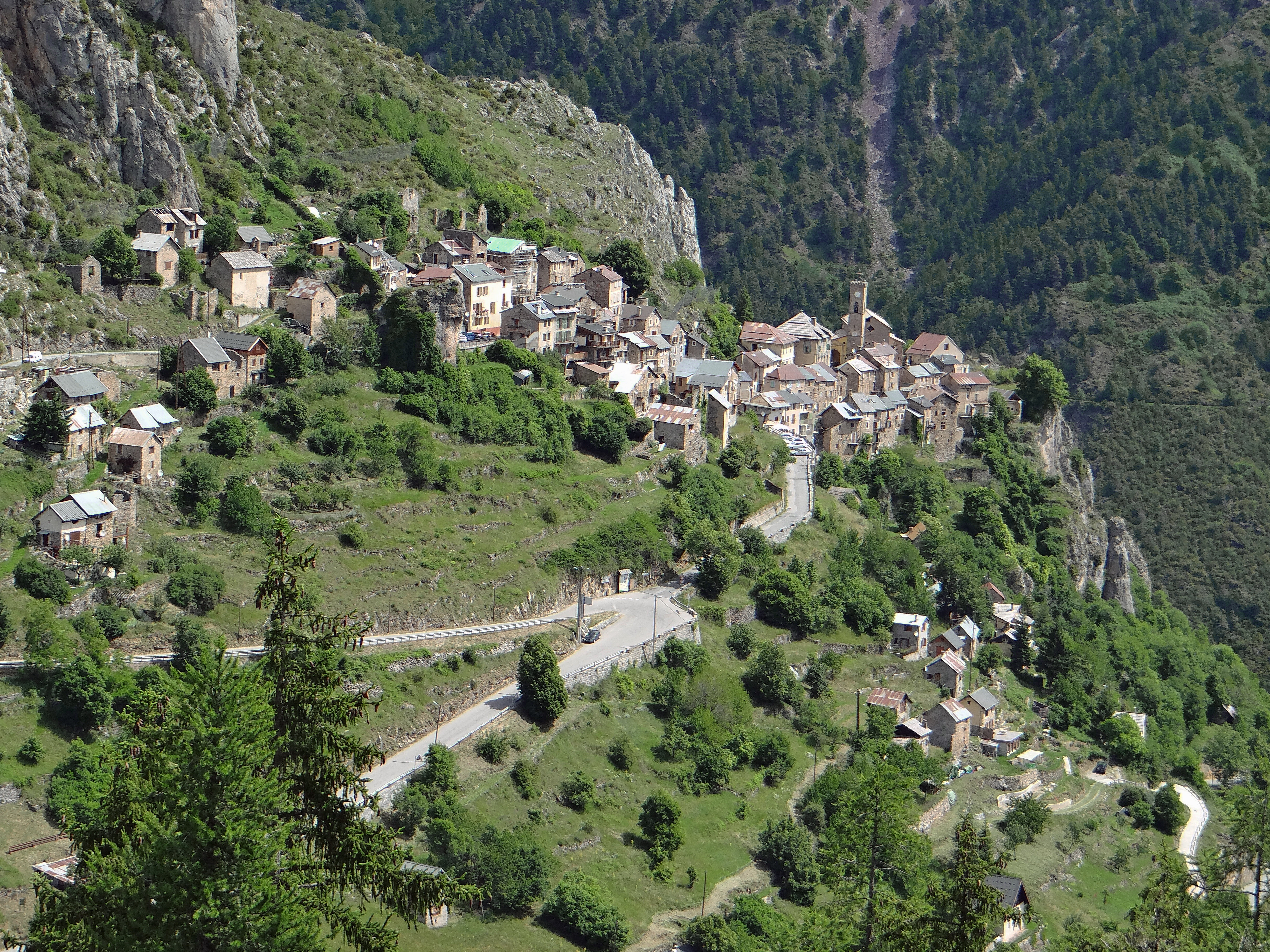 Roubion - Vue d'ensemble